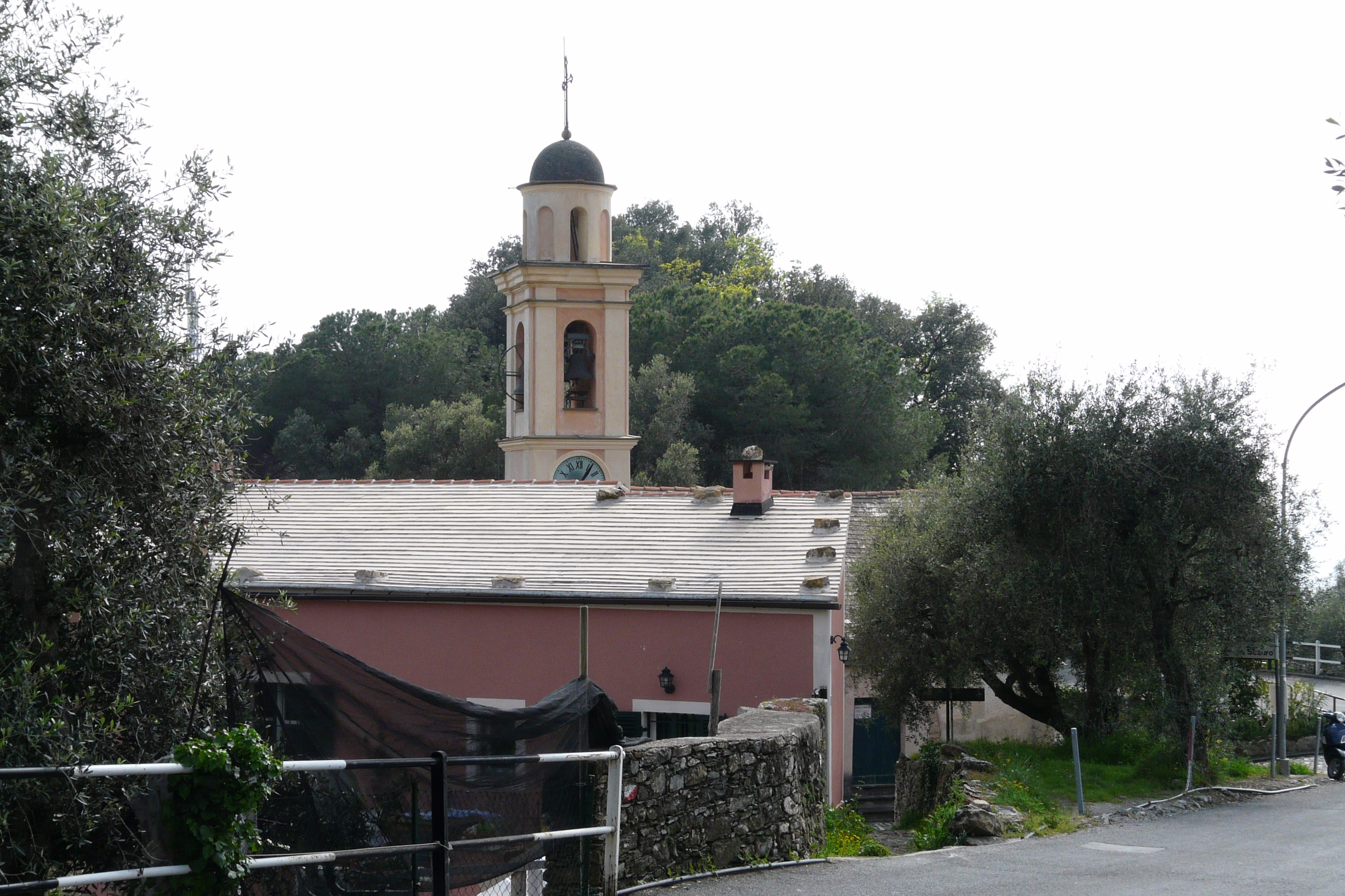 Chiesa di San Pantaleo, Zoagli, Liguria, Italia